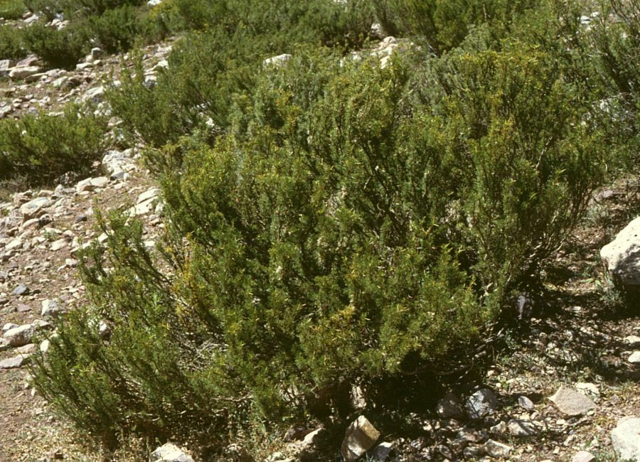 Adesmia pinifolia, Hülsenfrüchtler (Fabaceae), Schmetterlingsblütler (Faboideae) - Argentinien/Argentina, Paso de Uspallata, Puente del Inca, ca. 2700 m s.m. (Prov. Mendoza)